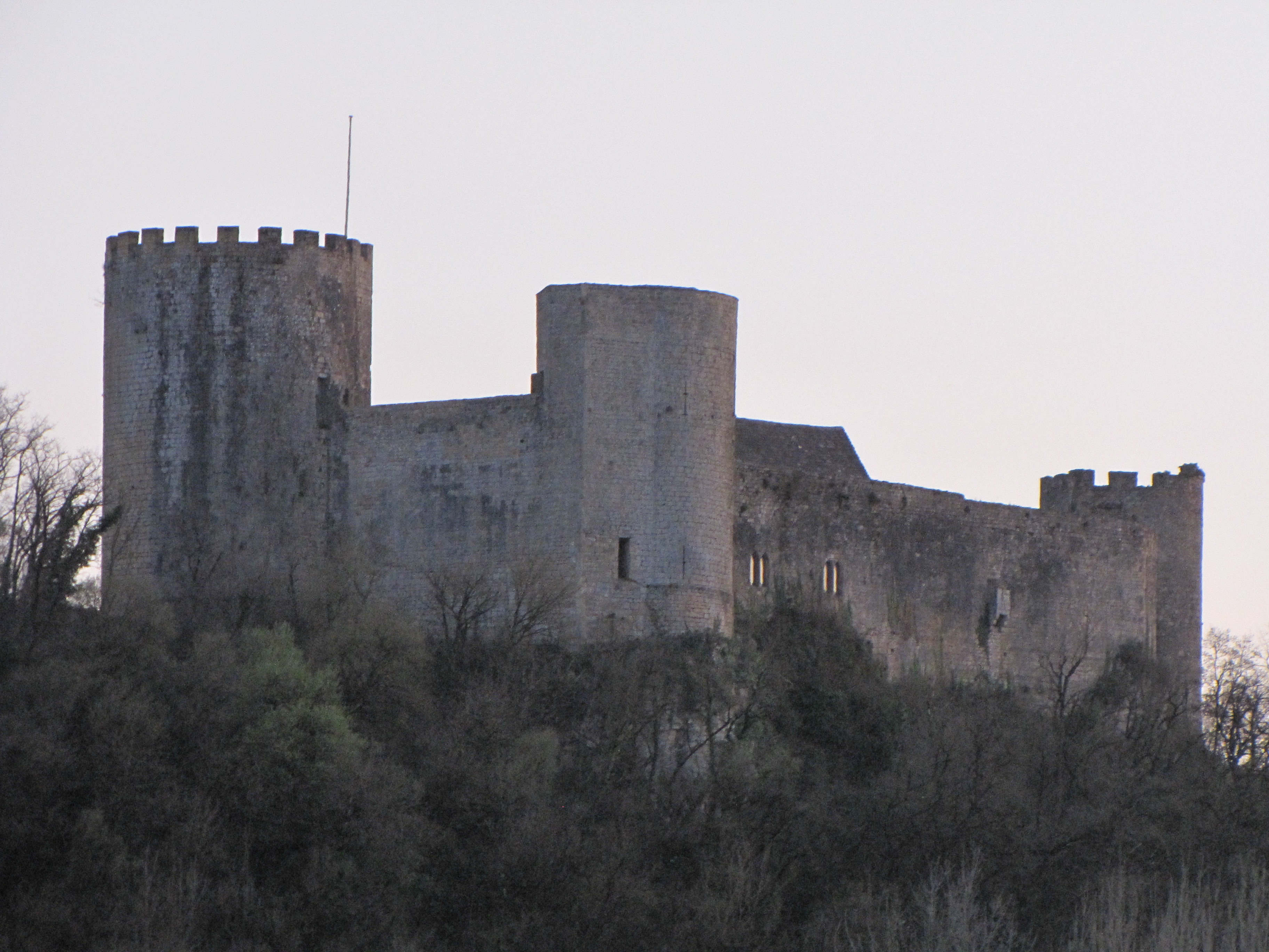 Château des Rois ducs à Sauveterre-la-Lémance